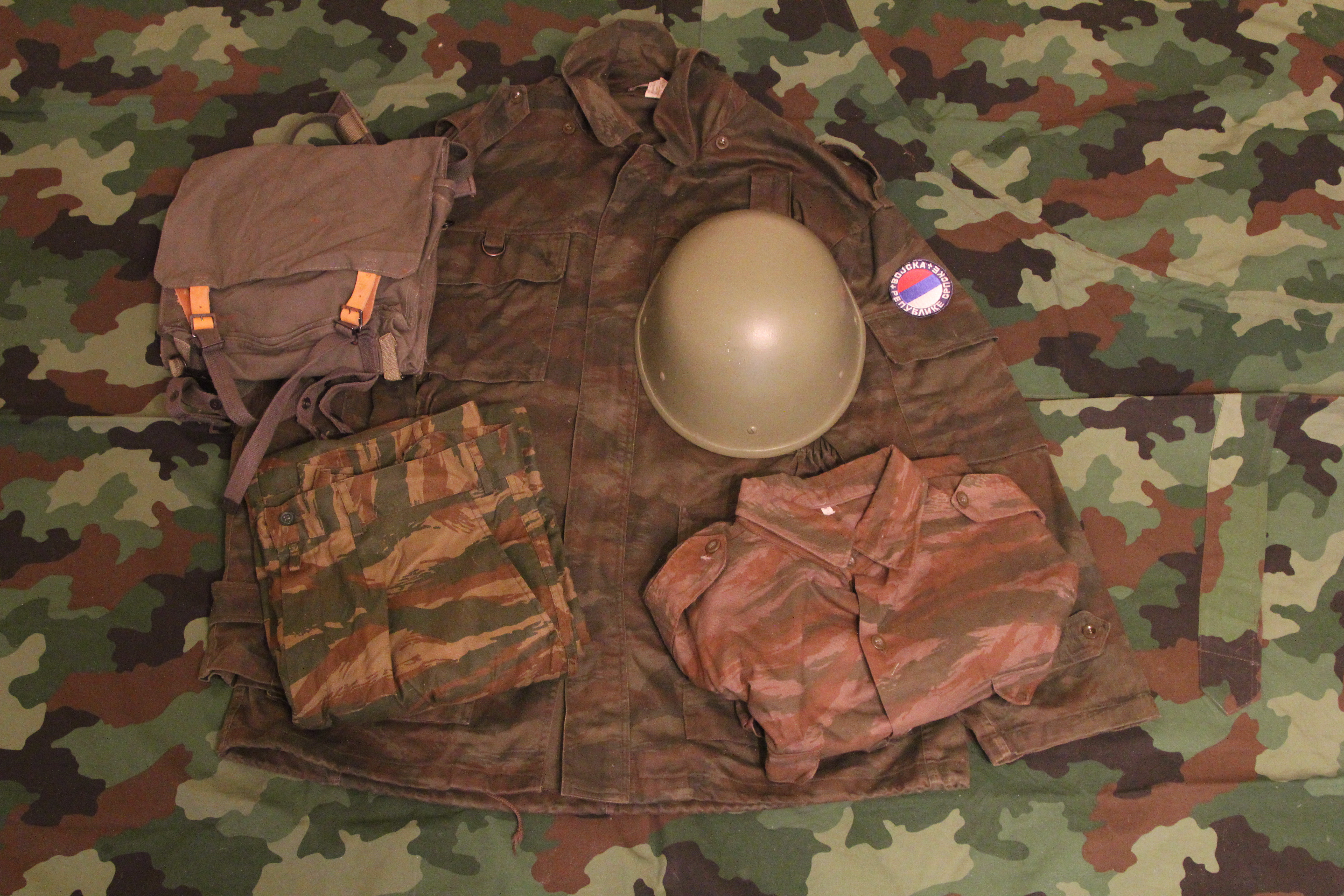 Комплект формы и снаряжения солдата Войска Республики Сербской.